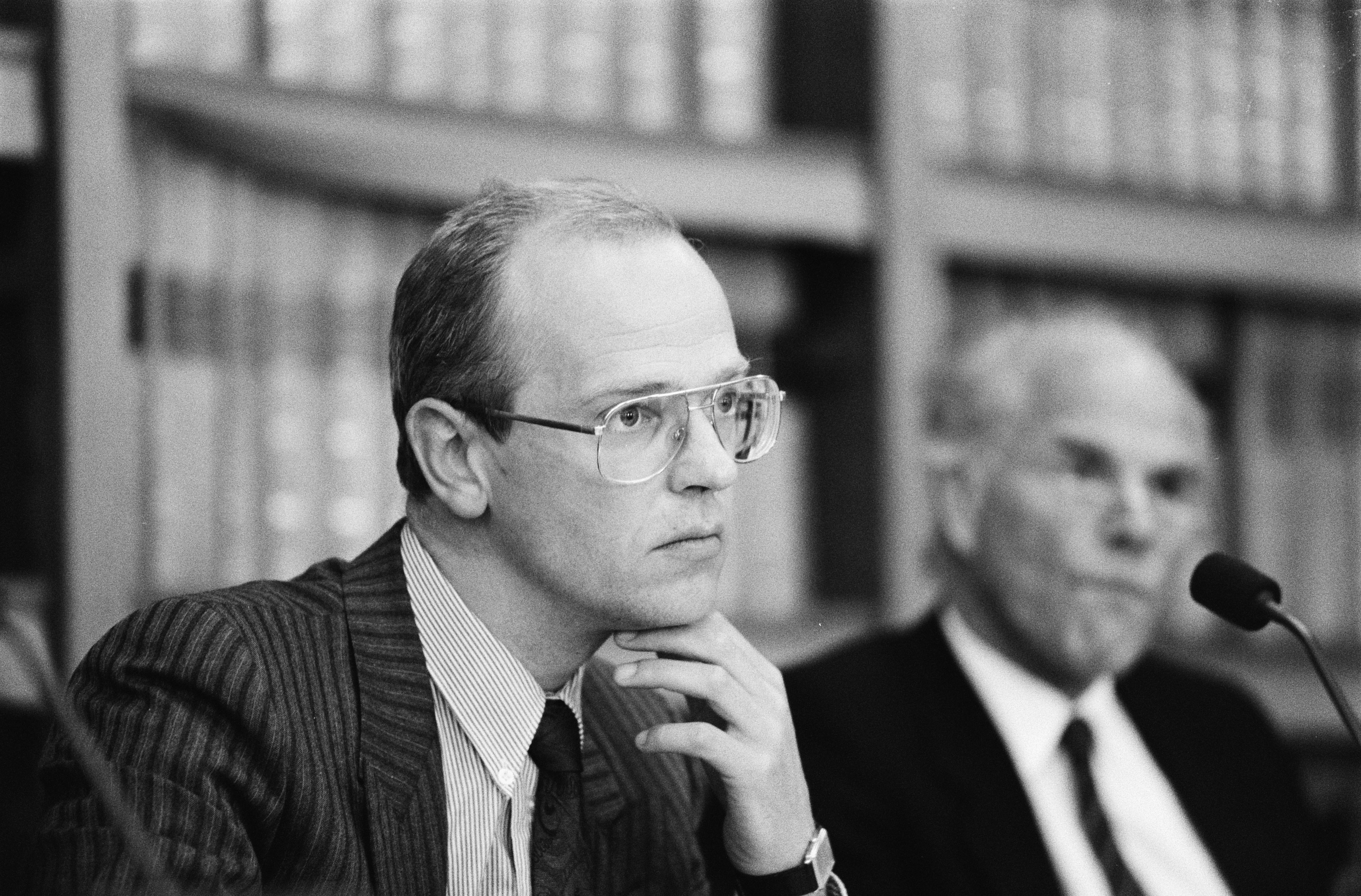 Collectie / Archief : Fotocollectie Anefo Reportage / Serie : Directeur van het Centraal Plan Bureau drs. Gerrit Zalm spreekt met de Tweede Kamer Commissie Economische Zaken Beschrijving : directeuren, commissies Datum : 24 mei 1989 Trefwoorden : commissies, directeuren Persoonsnaam : Zalm, Gerrit Fotograaf : Bogaerts, Rob / Anefo Auteursrechthebbende : Nationaal Archief Materiaalsoort : Negatief (zwart/wit) Nummer archiefinventaris : bekijk toegang 2.24.01.05 Bestanddeelnummer : 934-4592